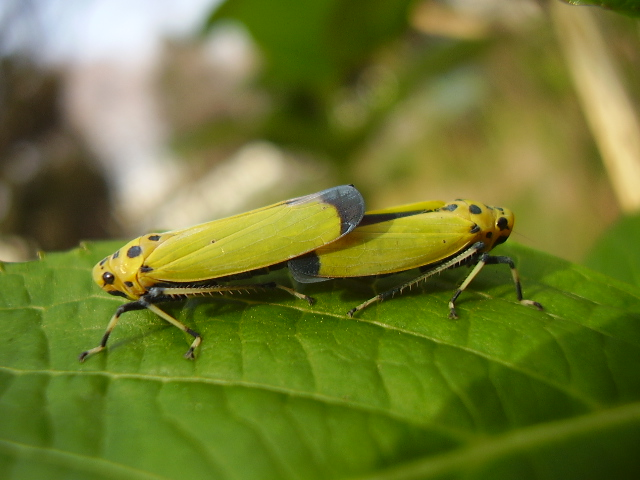 和名:ja:ツマグロオオヨコバイ (Japanese name : Tsumaguro-ōyokobai)